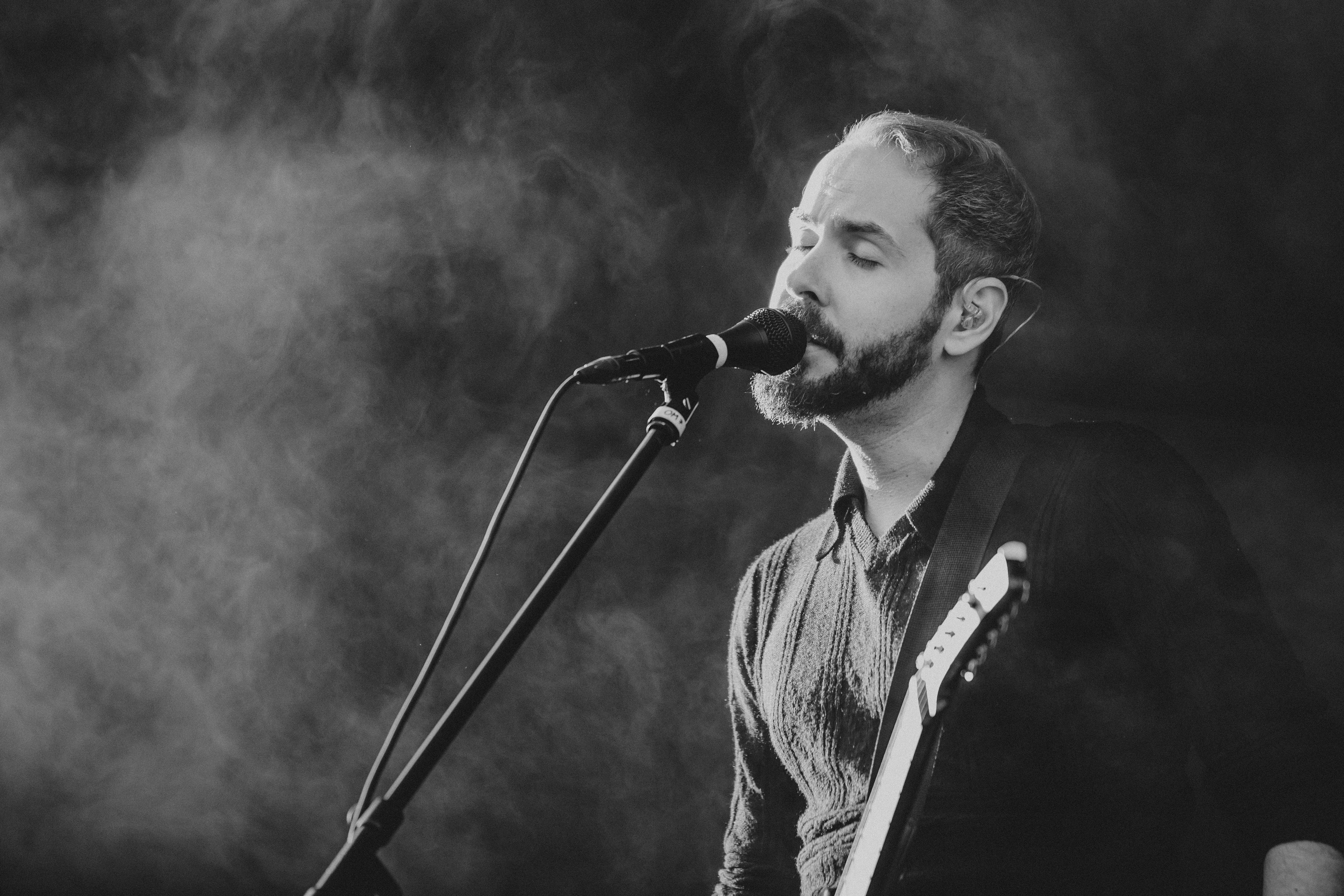 Photo: Krists Luhaers // @Kristsll